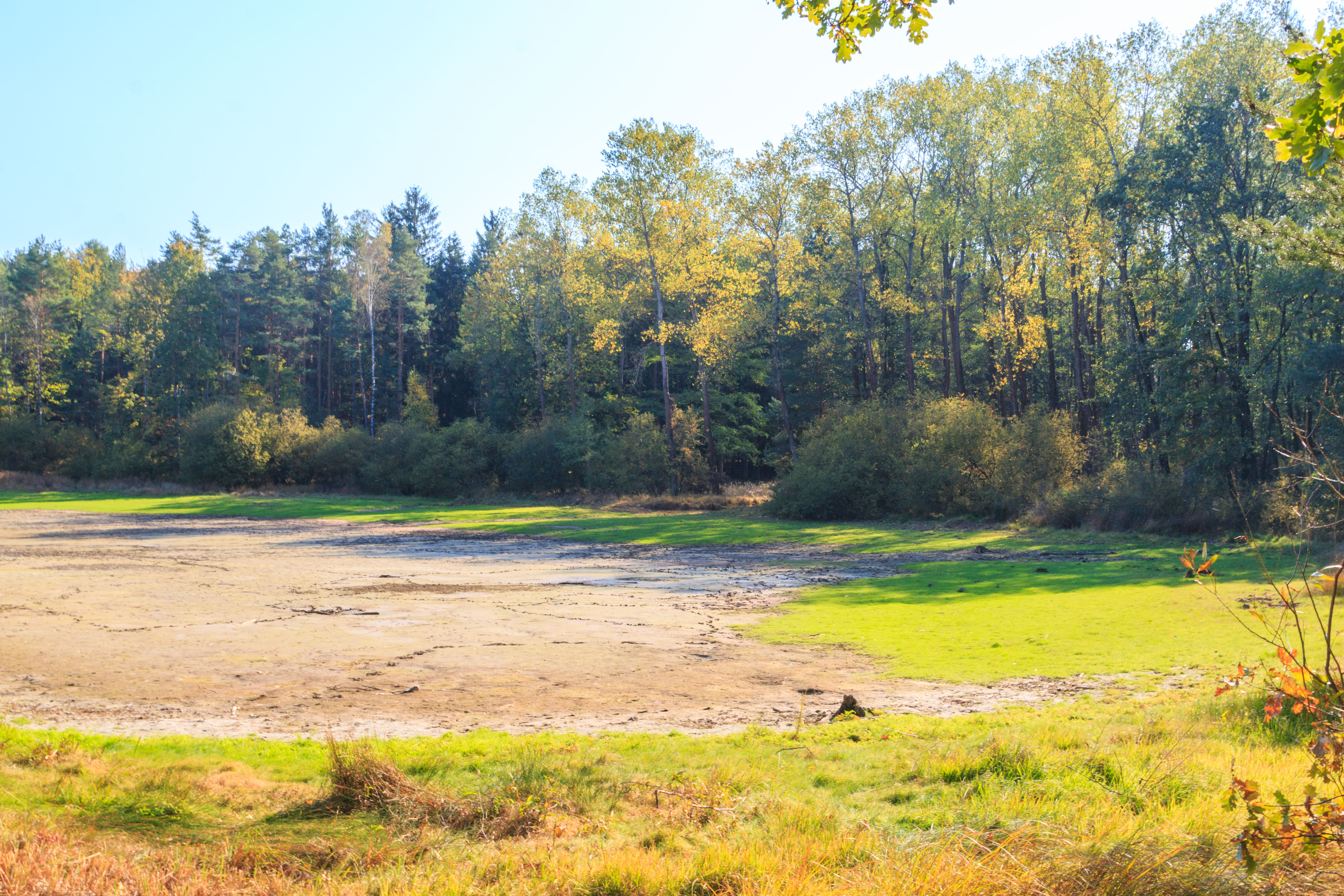 Rybník Malá Straka u Smrčku Project: Vodstvo. Ticket: 1617.